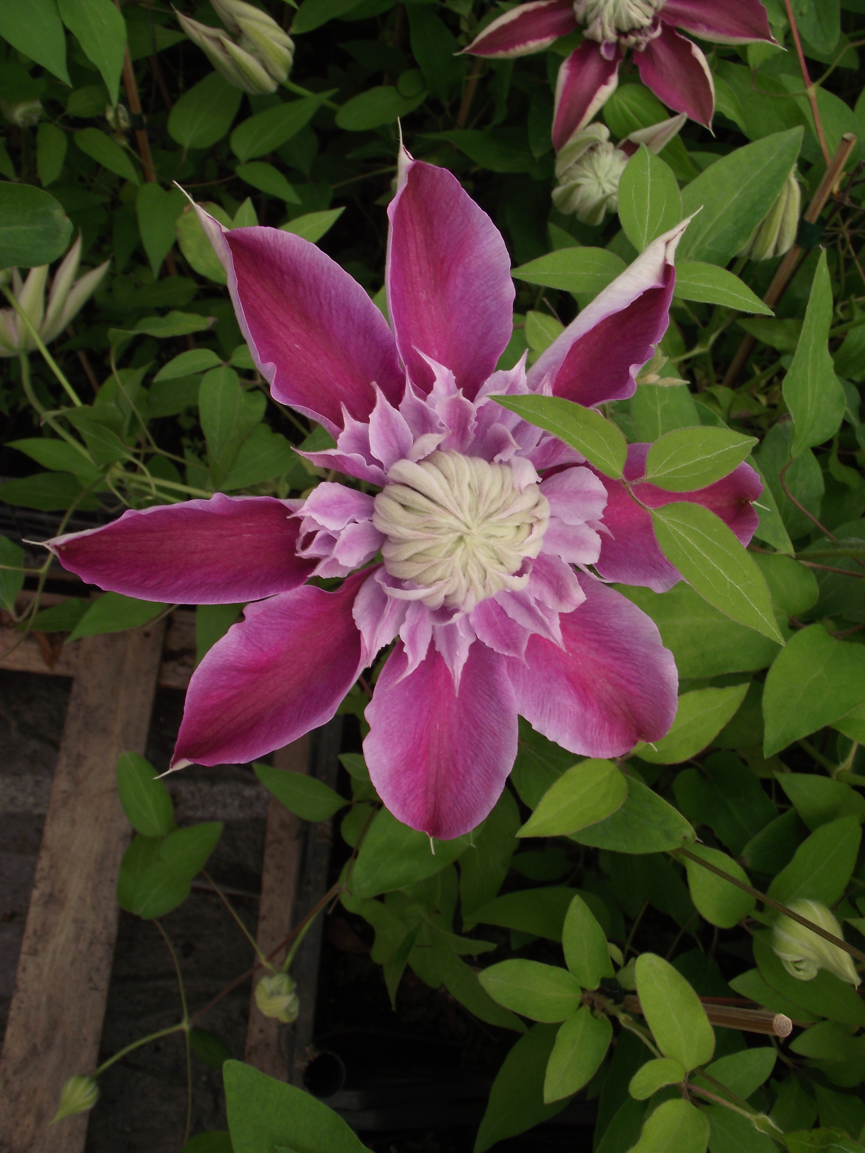 Clematis patens josephine evijohill 2